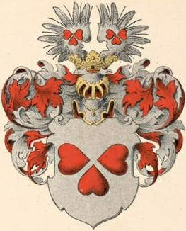 Löschern von Hertzfeldi suguvõsa aadlivapp